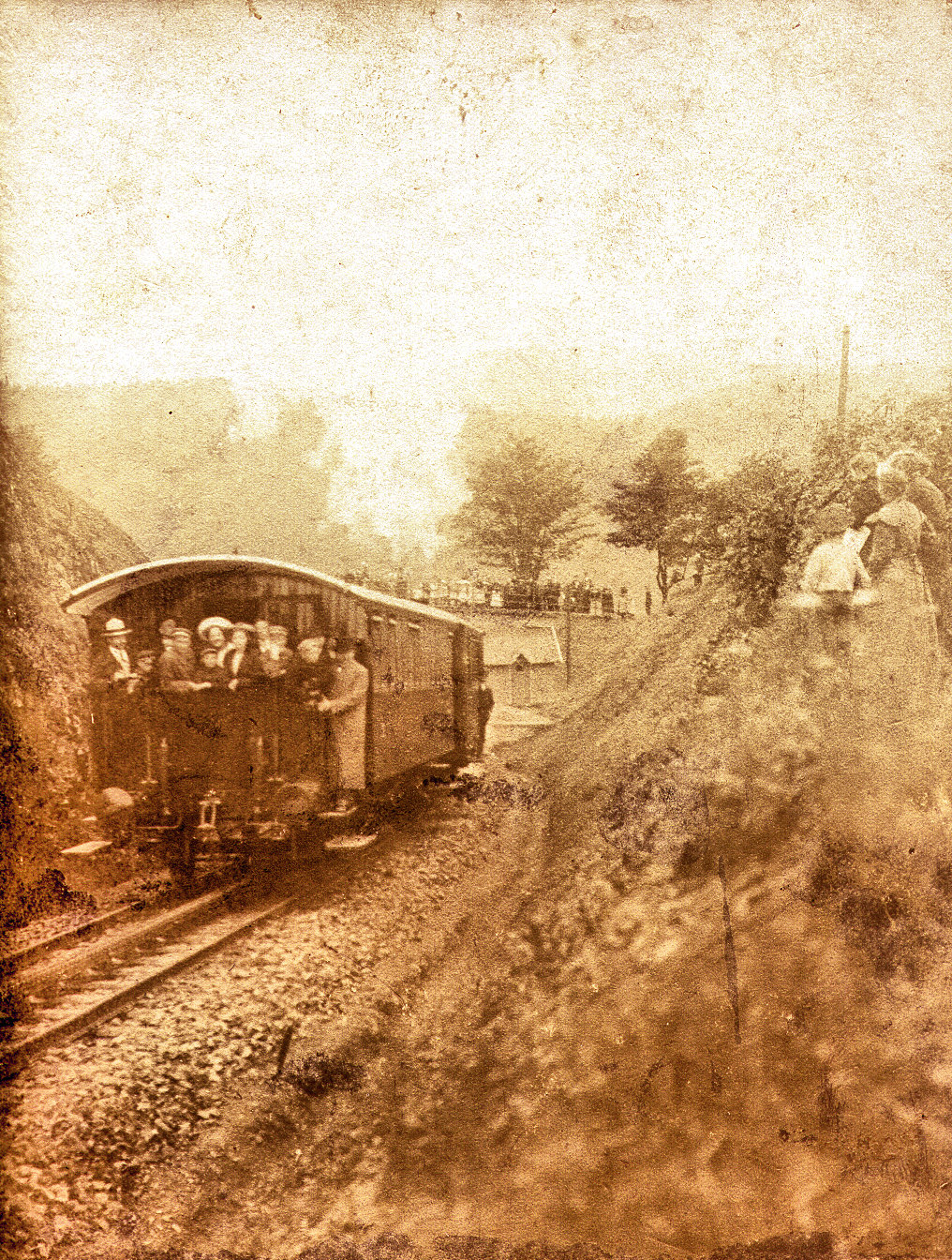 Erste Fahrt der Andreasberger Zahnradbahn